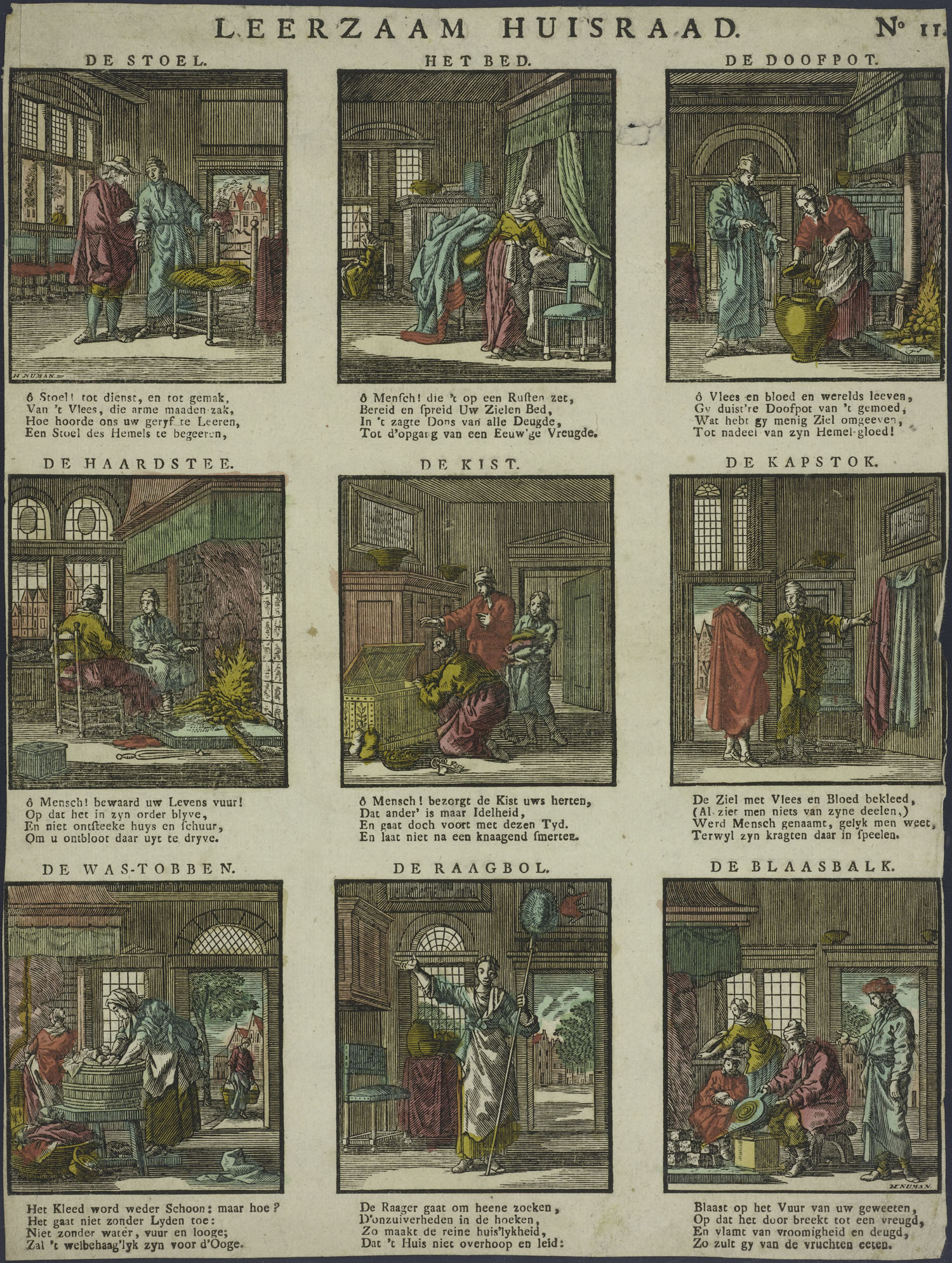 Centsprent met 3 x 3 omkaderde houtsneden met afbeeldingen van huisraad: de stoel, het bed, de doofpot, de haardstee, de kist, de kapstok, de wastobbe, de ragebol, de blaasbalg. Met vierregelige rijmende onderschriften.